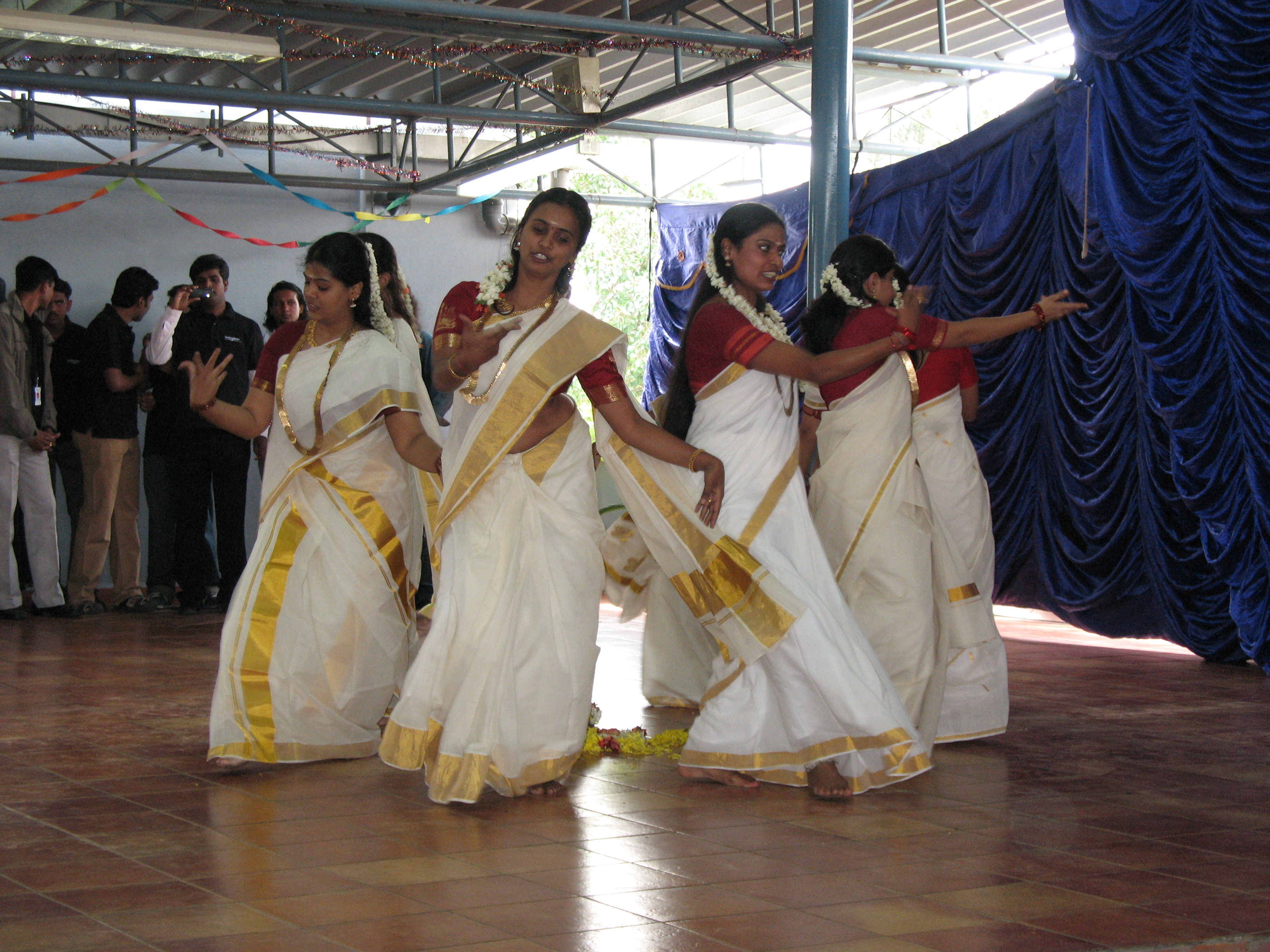 Thiruvathirakkali